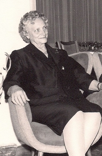 Es una fotografía del archivo de la radio, de la primera mujer locutora de la provincia de Neuquén.